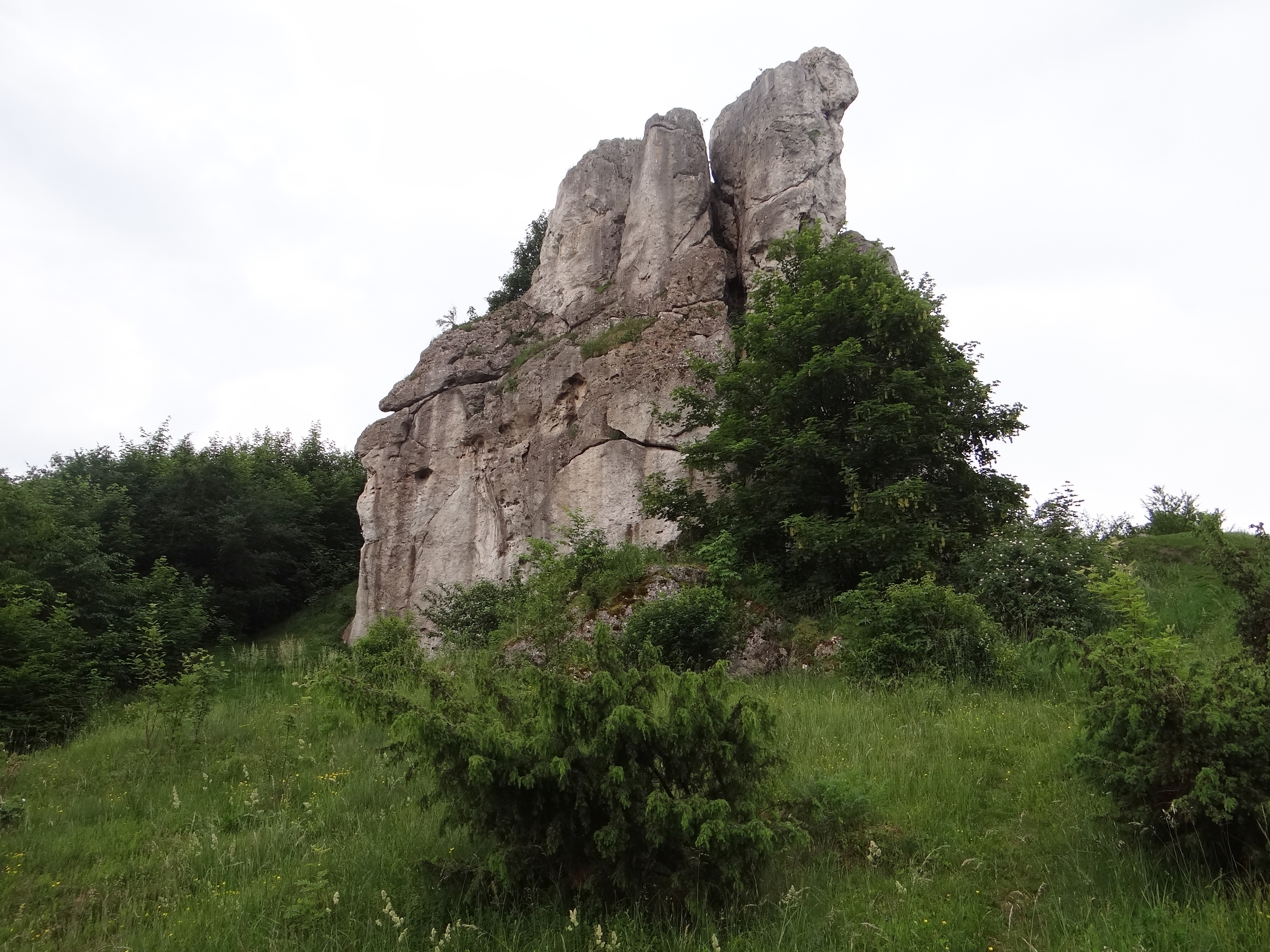 Skały Grupy Knura w Łutowcu